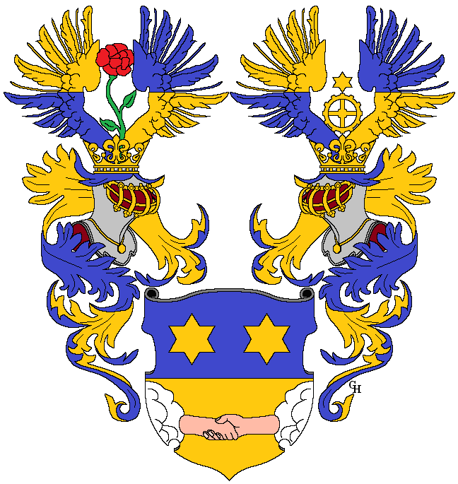 Wappen des böhmisch-österreichischen Großindustriellen (Likörfabriksbesitzers und Vizepräsidenten der Handels- und Gewerbekammer in Prag) Eduard Porges von Portheim (1826–1907, Sohn des 1841 geadelten Juda Leopold Porges von Portheim), verliehen anlässlich seiner Erhebung in den österreichischen Ritterstand 1879. Zeichnung von Gerd Hruška ( Für weitere Informationen zu dieser Standeserhebung siehe (